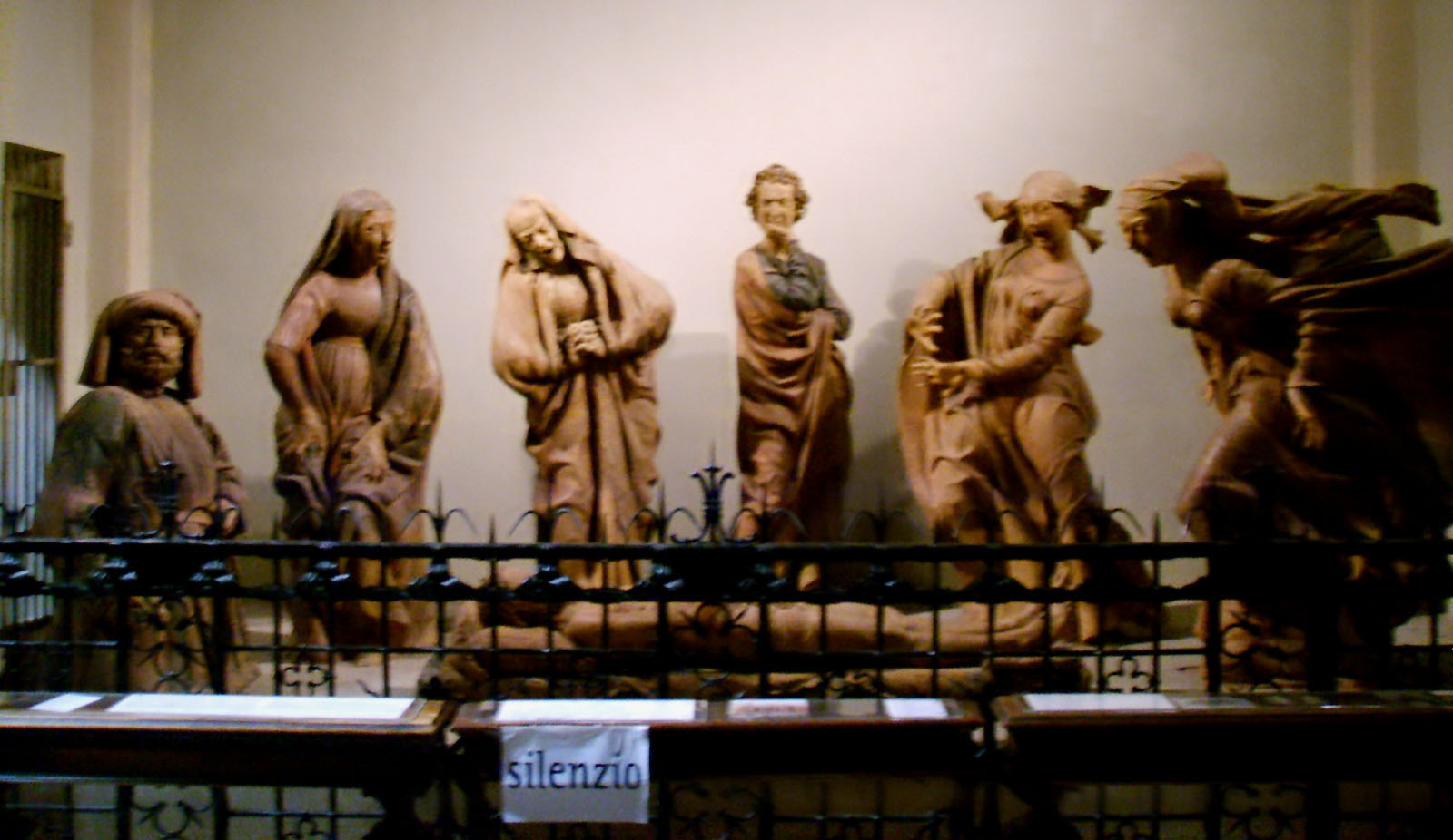 Compiato sul Cristo morto by Niccolò del'Arca